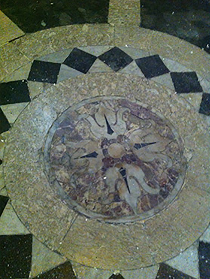 Pavimento Monte dei Morti di Salerno